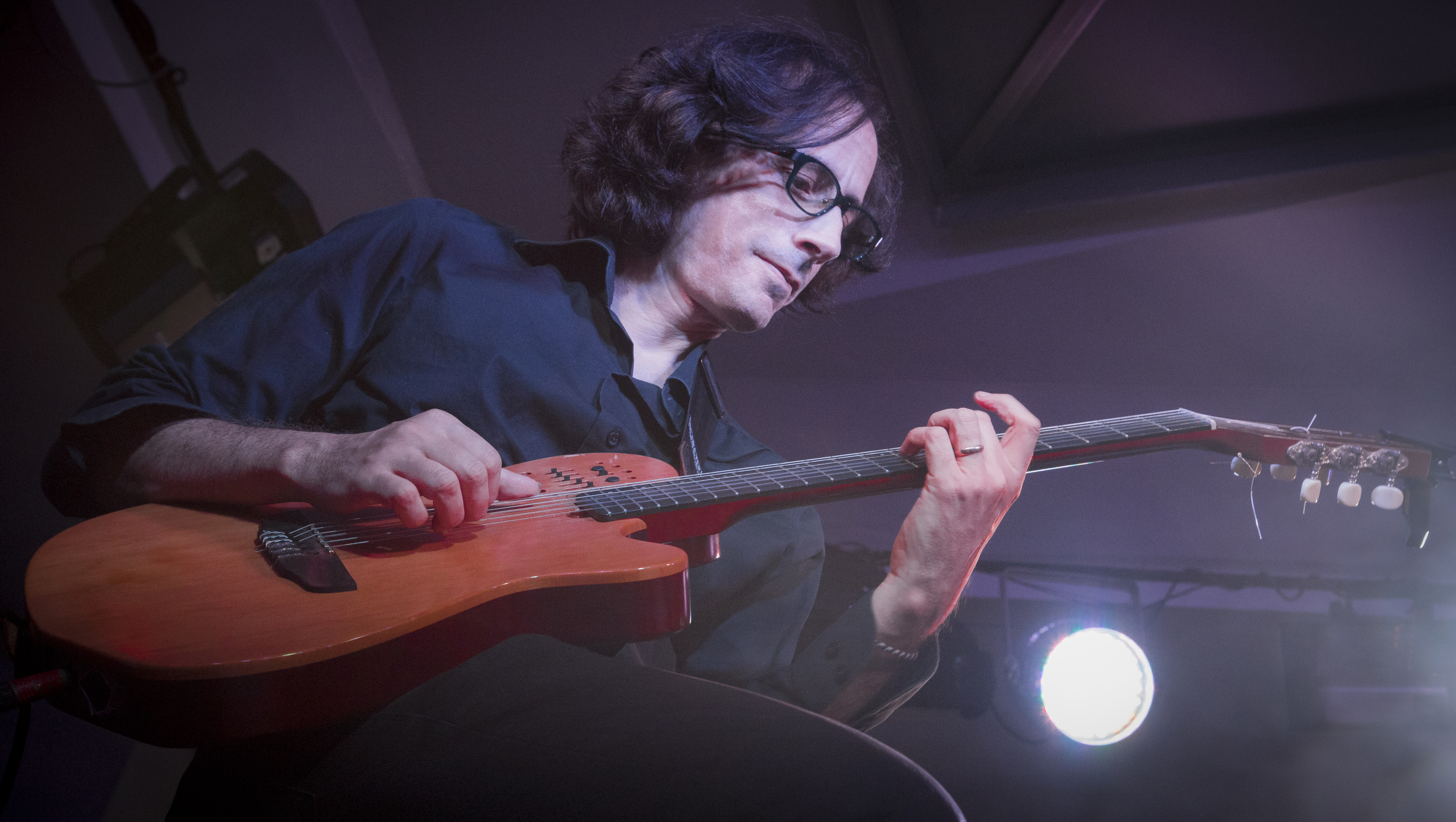 Emilio Martini_Cafe Miramar